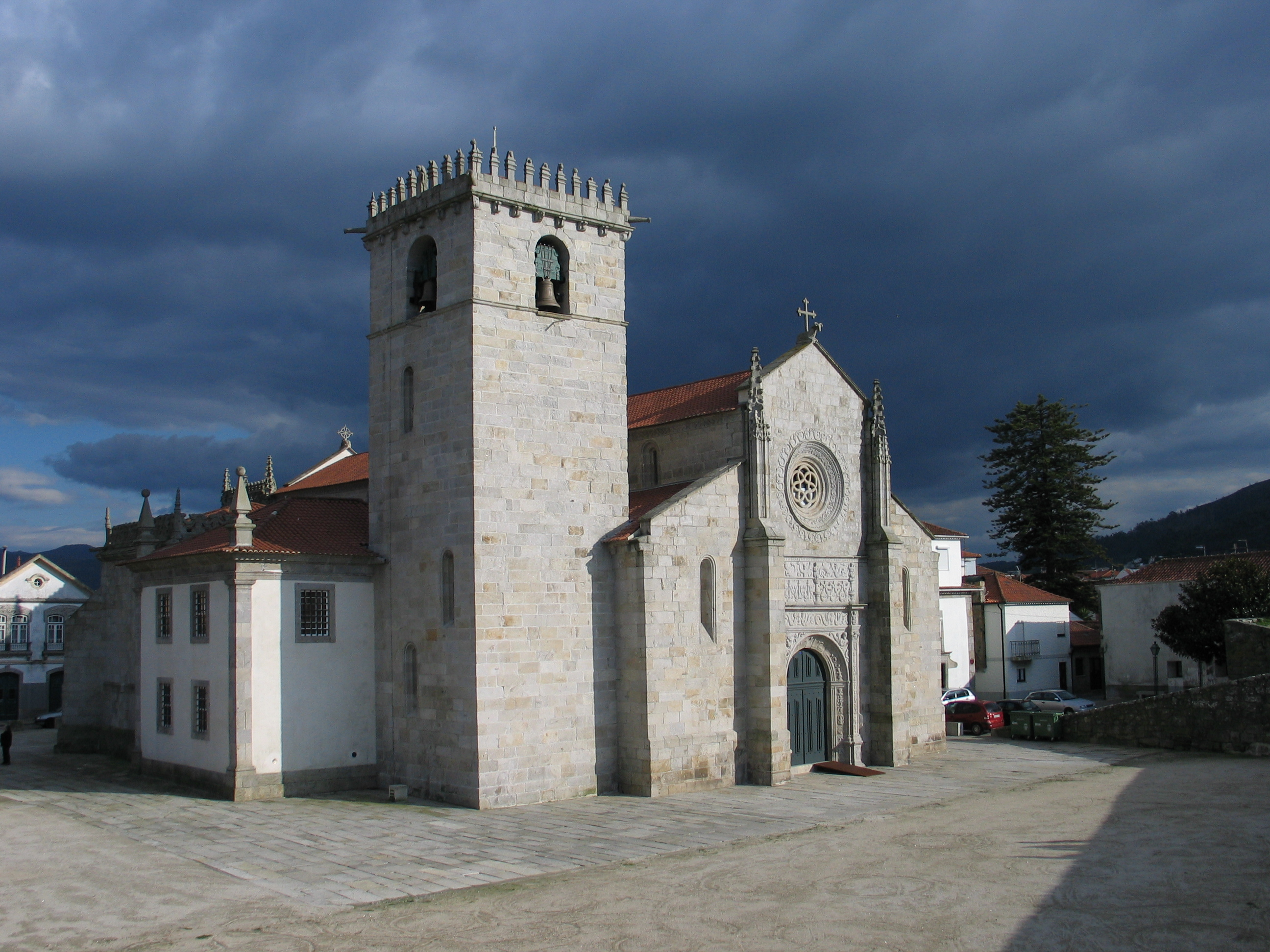 15th century church in Caminha, Portugal /Igreja Matriz de Caminha